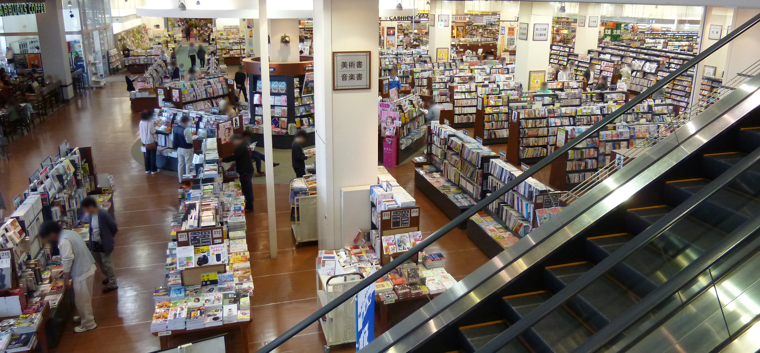 ガーデンパーク和歌山内にある、和歌山県内最大級の大型書店。